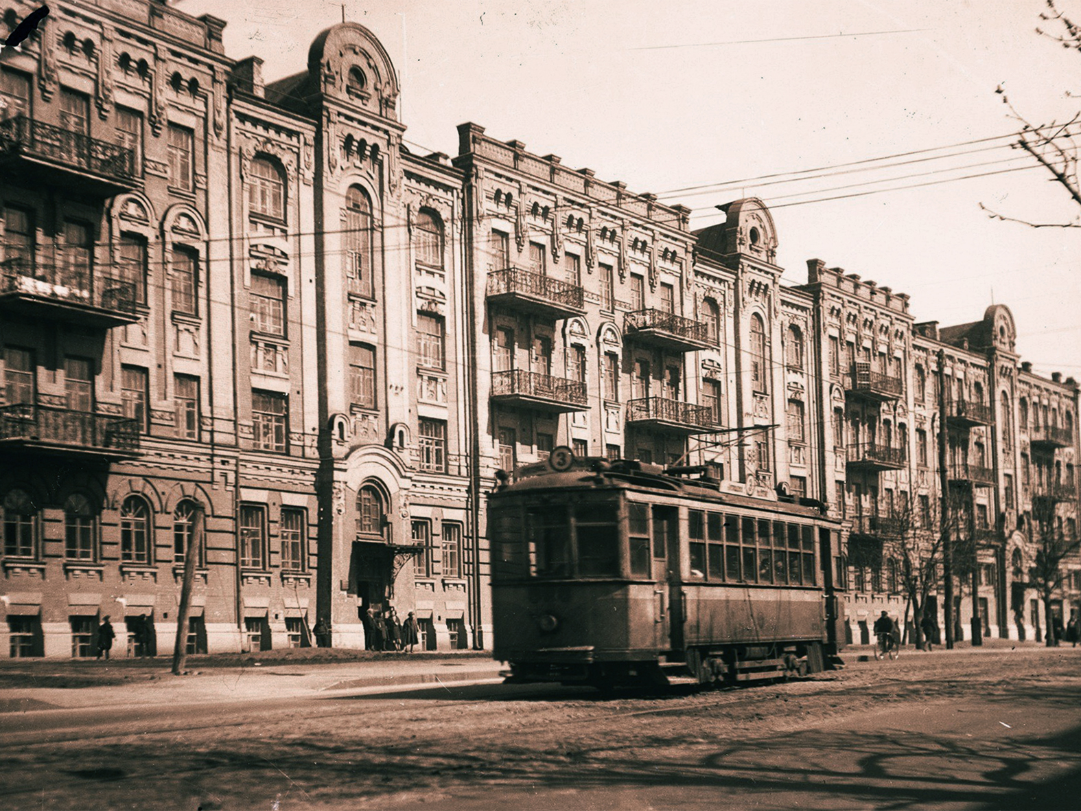 Прибутковий будинок Микільського собору на Печерську, Мазепи Івана вул., 11, Київ, Україна